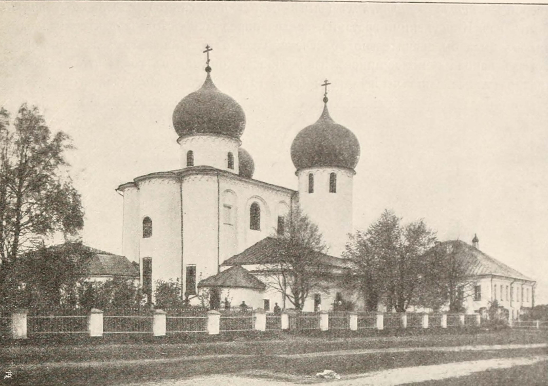 Монастырь Святого Антония Римлянина, собор. Конец XIX века